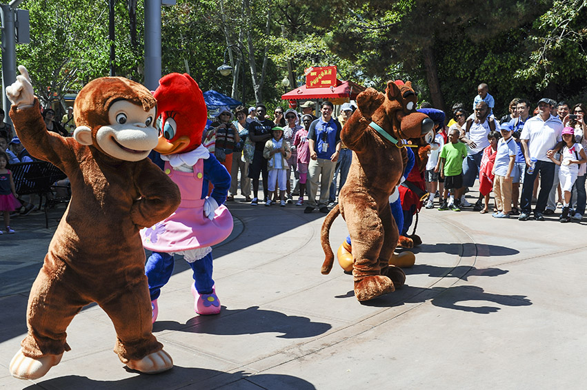 Los Angeles 2012